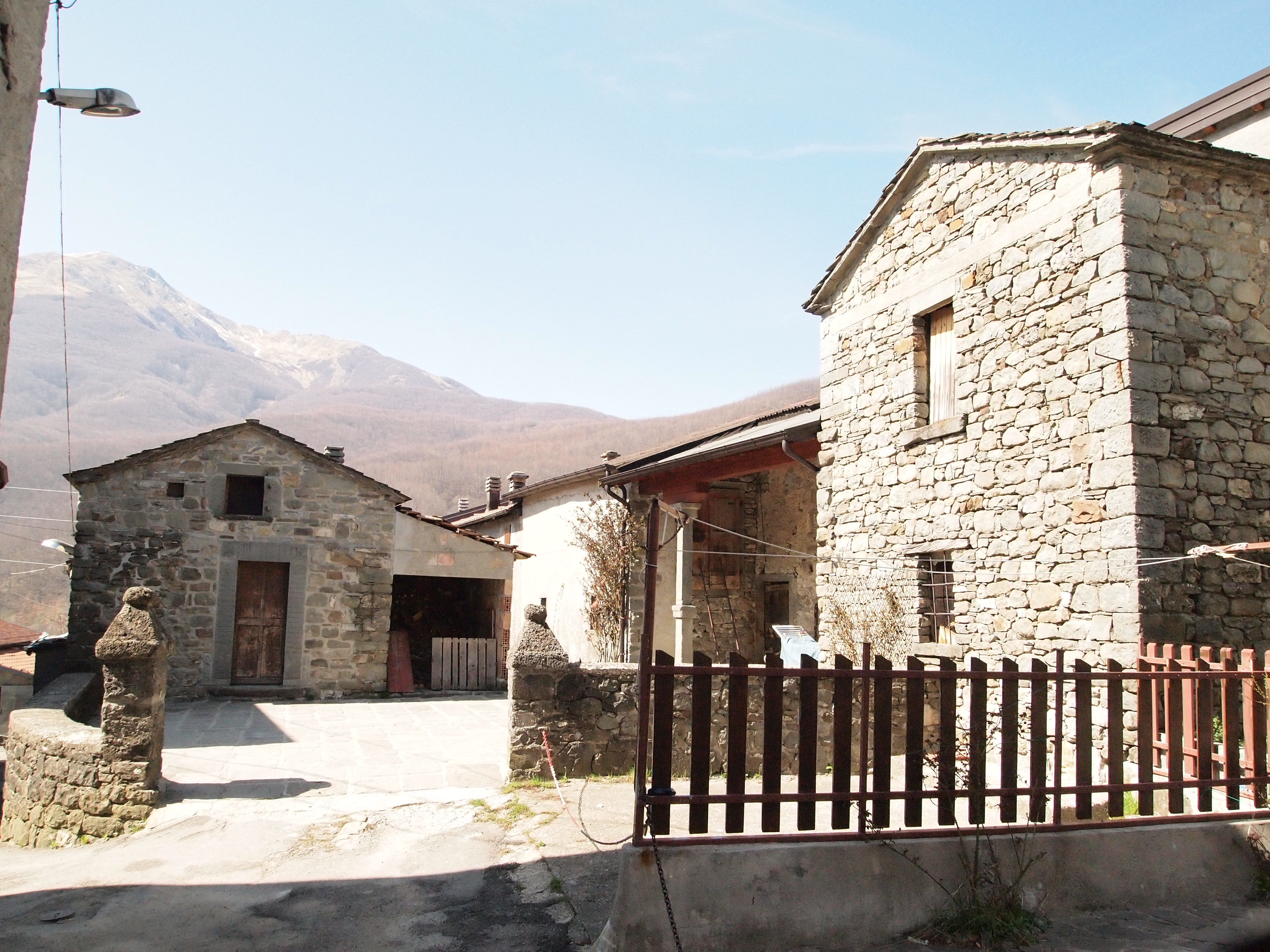 scorcio di Cerreto Alpi